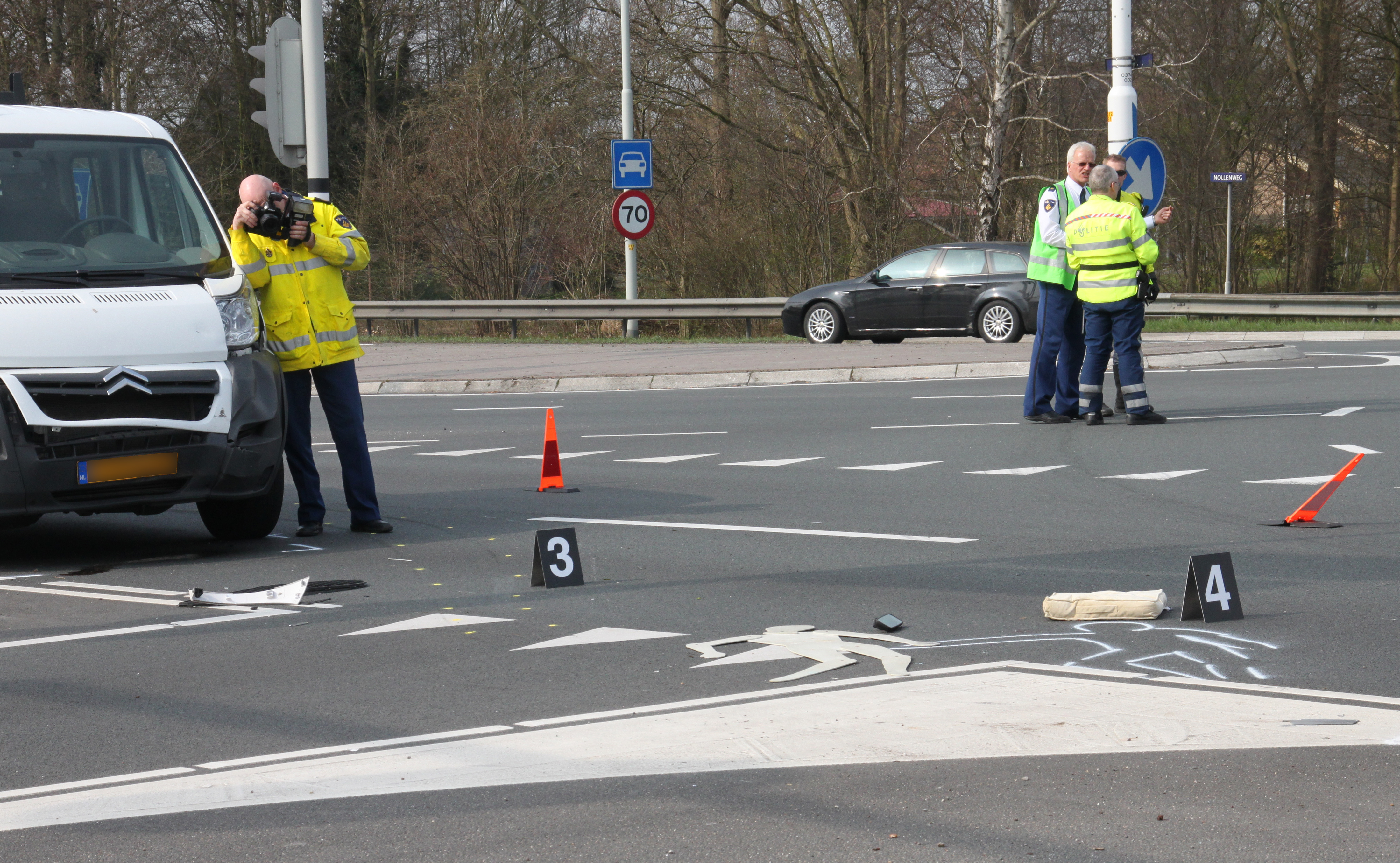 De Verkeers Ongevallen Analyse probeert duidelijk te maken hoe een ongeval heeft plaatsgevonden.